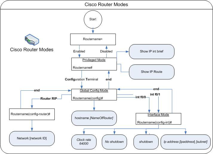 Cisco ISO Model Diagram